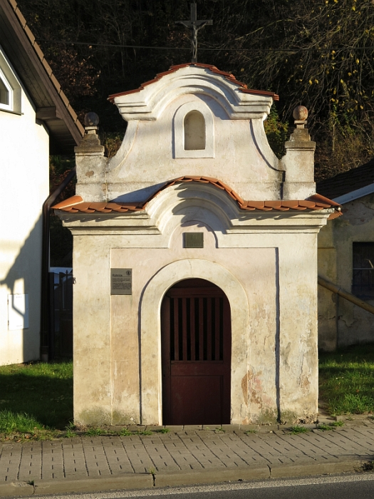 Kaplička, Rybnice.